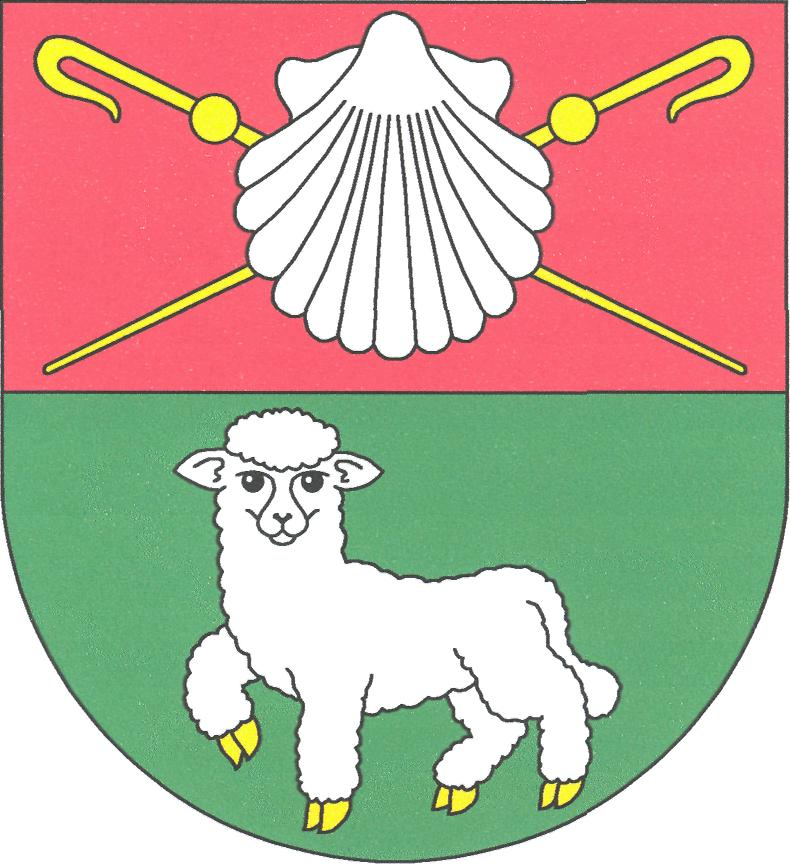 Znak obce Ovčáry (okres Kolín)